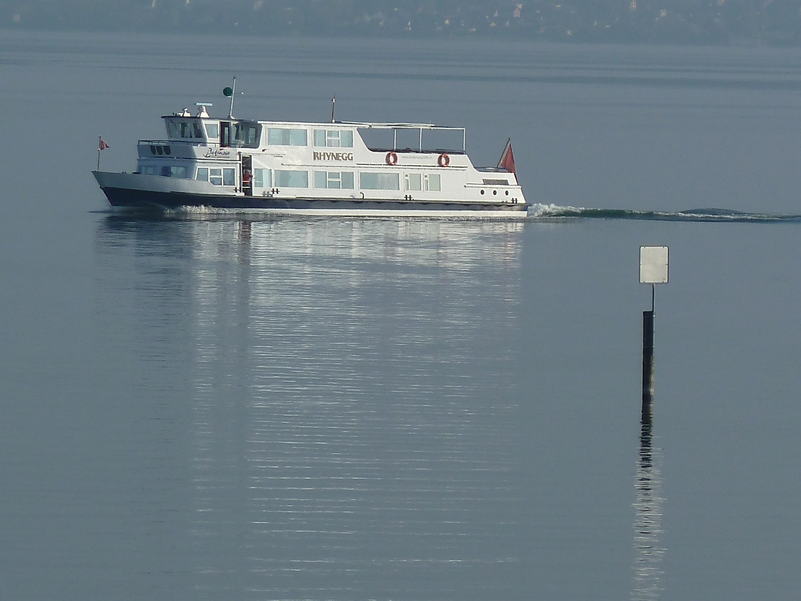 Die Rhynegg ist das größte der drei SBS-Schiffe mit Heimathafen Rorschach.